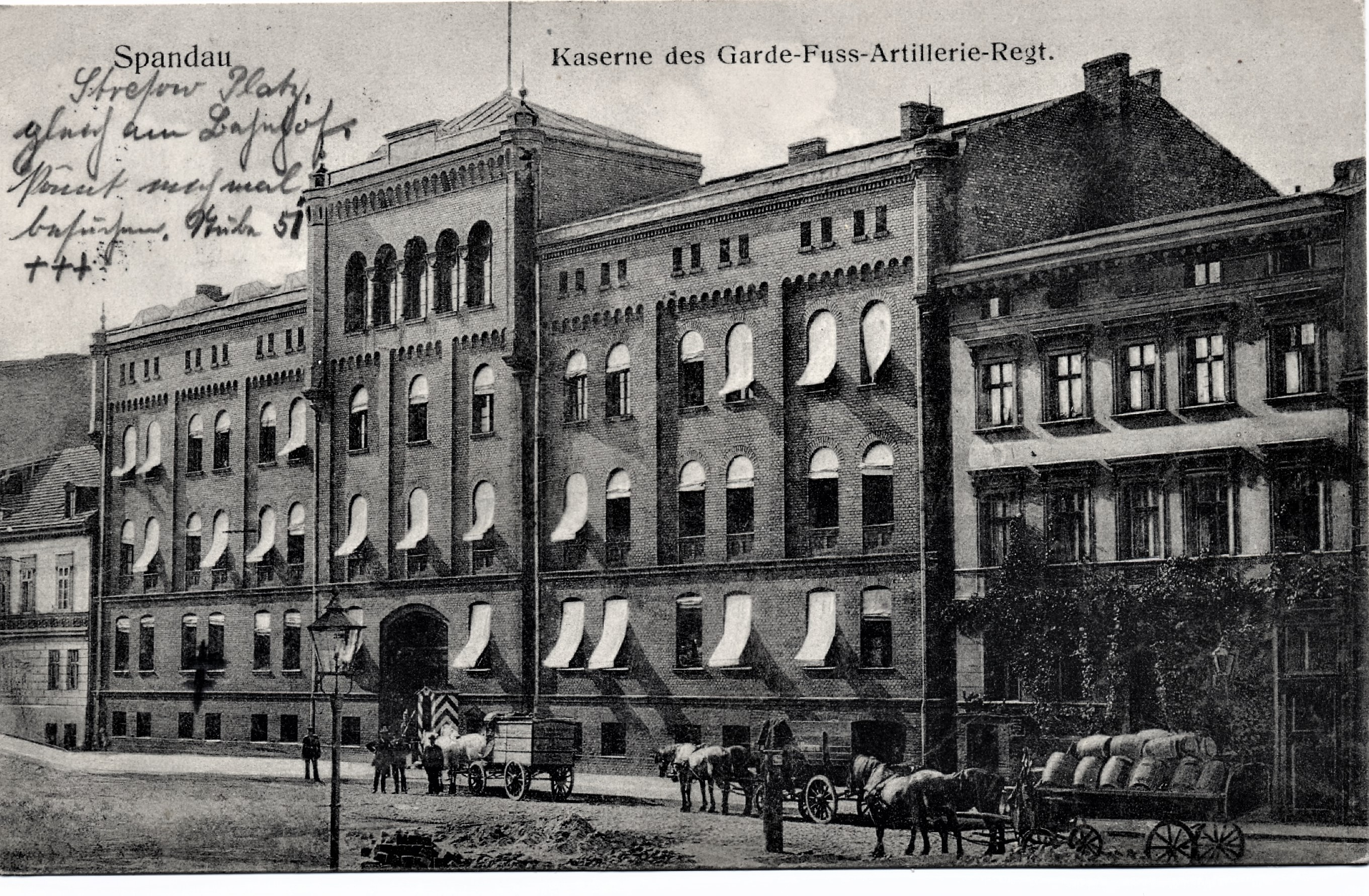 Die Ansichtskarte zeigt die Stresowkaserne II am Stresowplatz 5 und wurde (laut Poststempel) am 15. Juni 1917 versandt. Es ist die Kaserne des Garde-Fuss-Artillerie-Regiments auf dem Stresow.